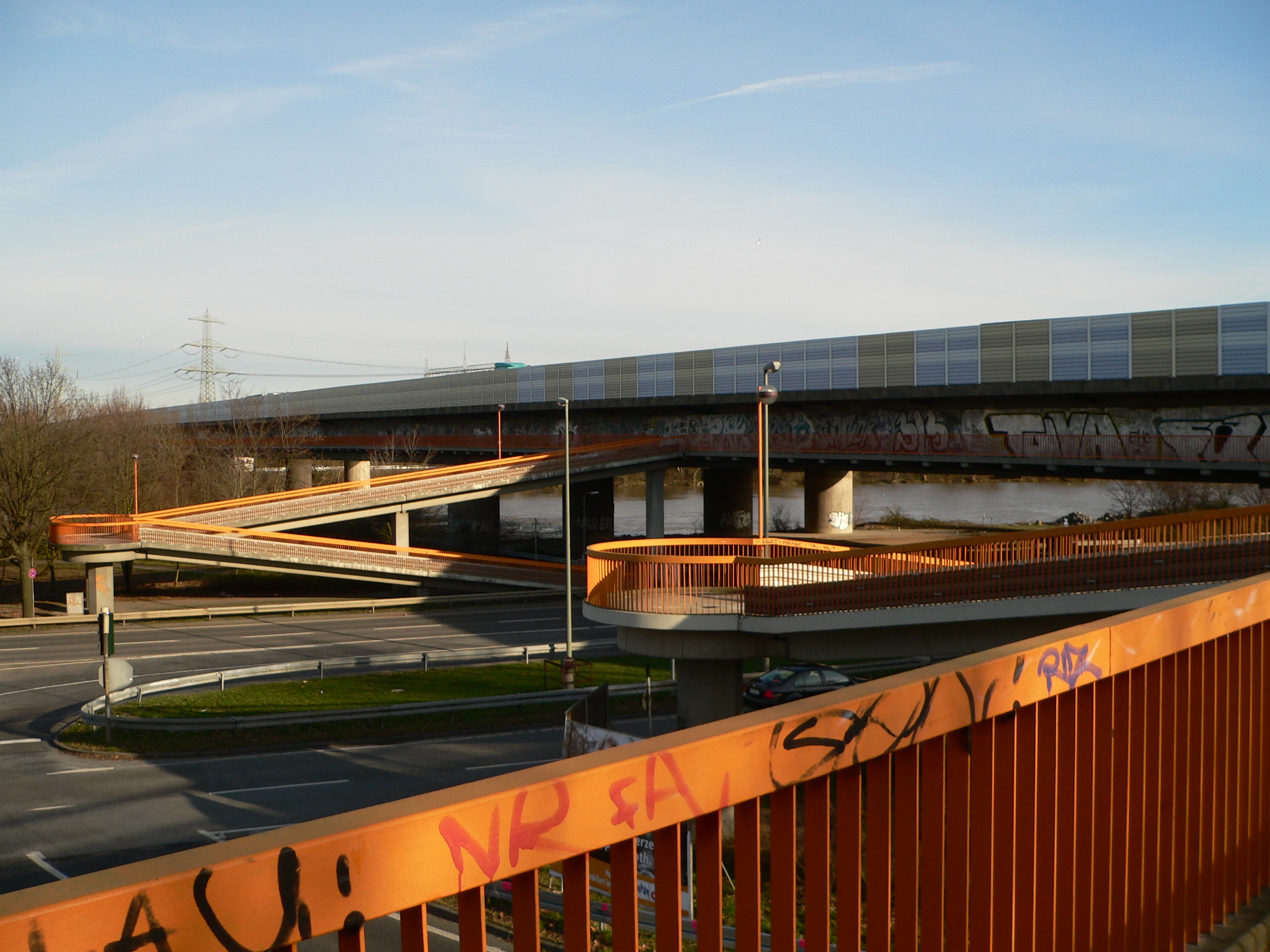 Die Europabrücke Frankfurt am Main, Blick von Südwesten